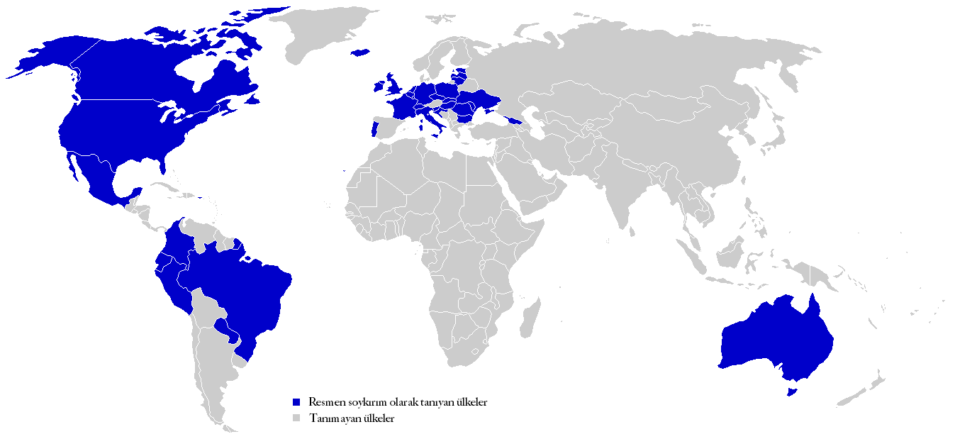 Holodomor'u resmen soykırım olarak tanıyan ülkeler